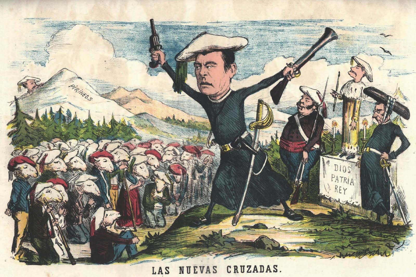 Caricatura del Carlismo con sus ideales y personajes principales por la revista sátirica La Flaca del siglo XIX.